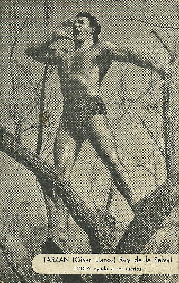 César Llanos, actor argentino que interpretó a Tarzán en una emisión radial en Las aventuras de Tarzán de la década de 1950.